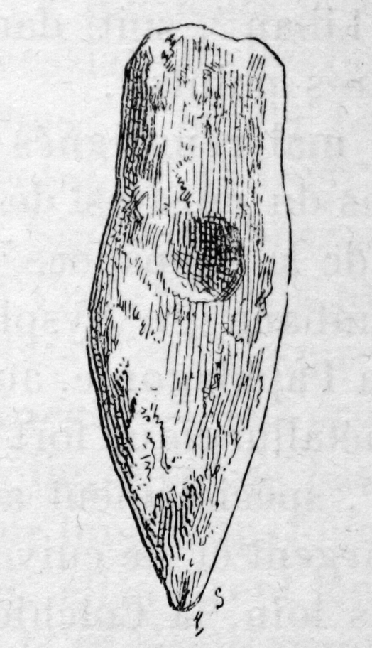 photographie d'une illustration de l'ouvrage libre de droit Charles Daremberg, Edmond Saglio Dictionnaire des antiquités grecques et romaines, tome 3, volume 2, Hachette, 1877-1914, p. 1852 ; esquisse d'un marteau de mineur du Laurion.